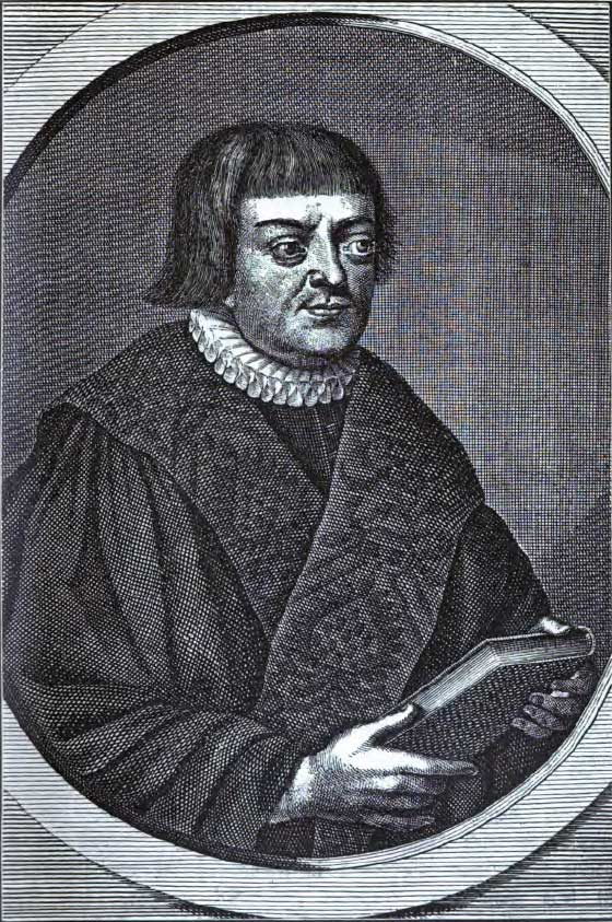 Stephan Kempe (1495-1540) war lutherischer Theologe und Reformator